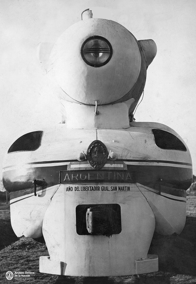 Locomotora de fabricacion nacional llamada "Argentina" durante los años 50.